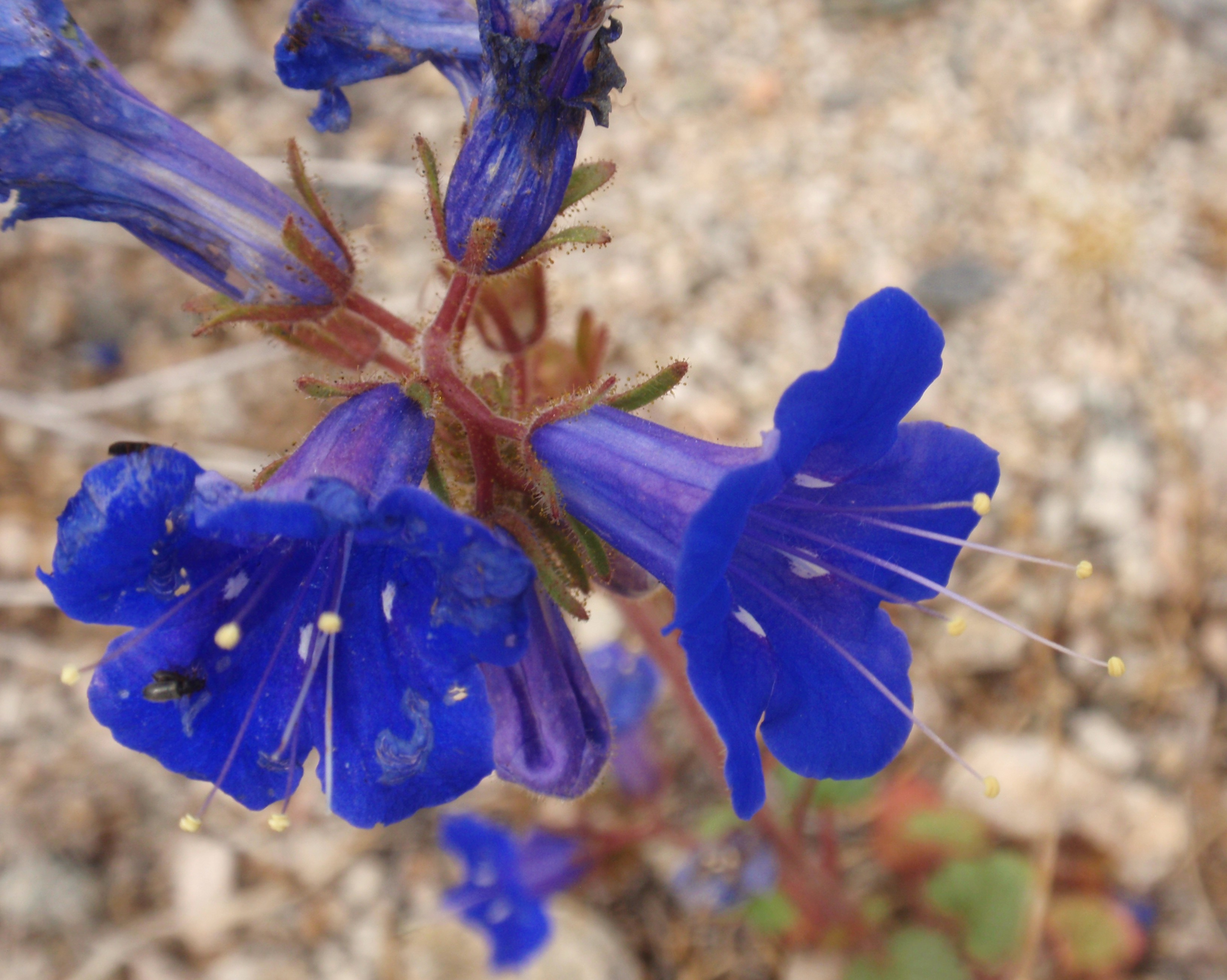 Desert Bluebells 02